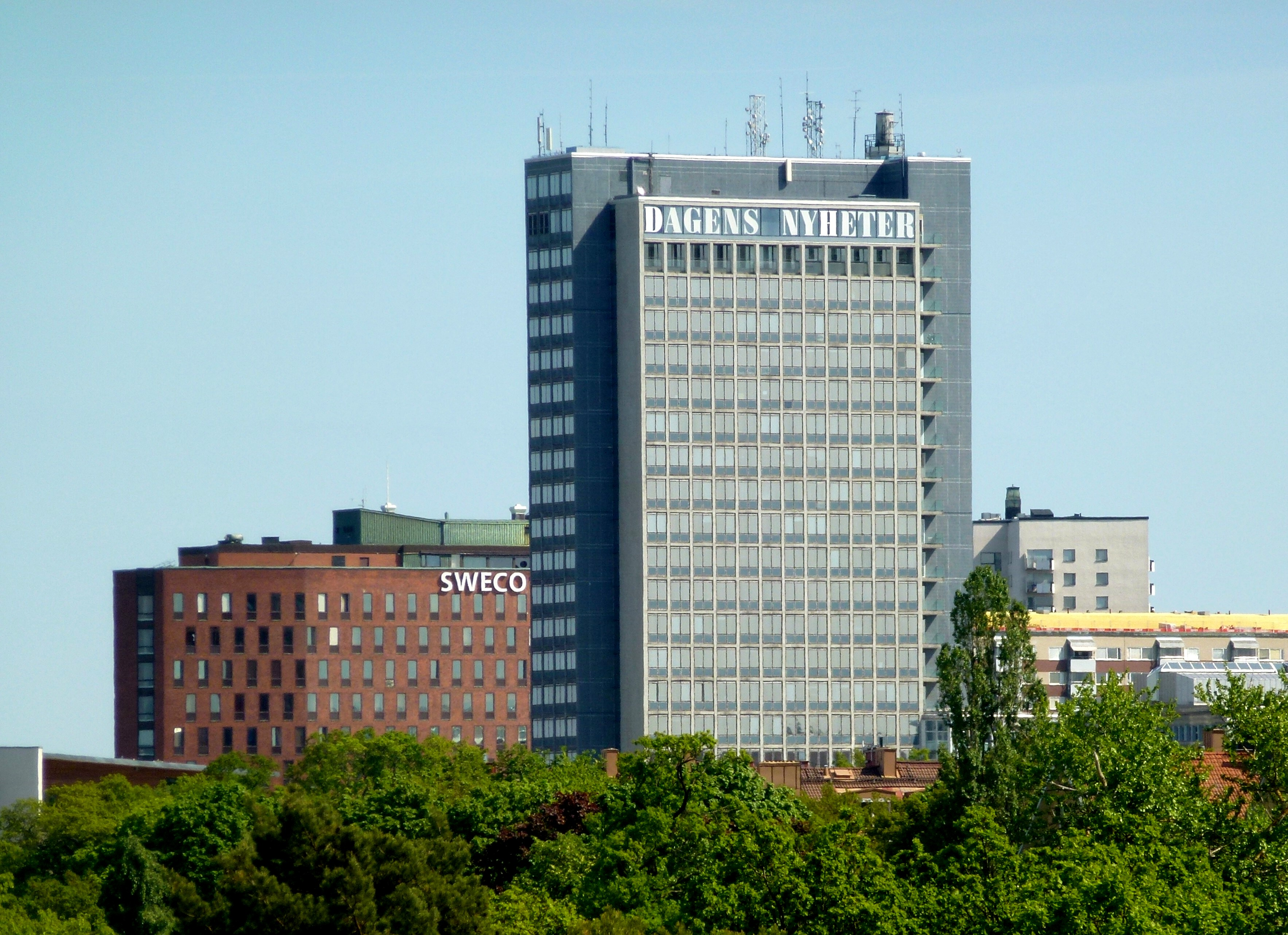 DN-skrapan och bakom den f.d. Huset för Svenska dagbladet